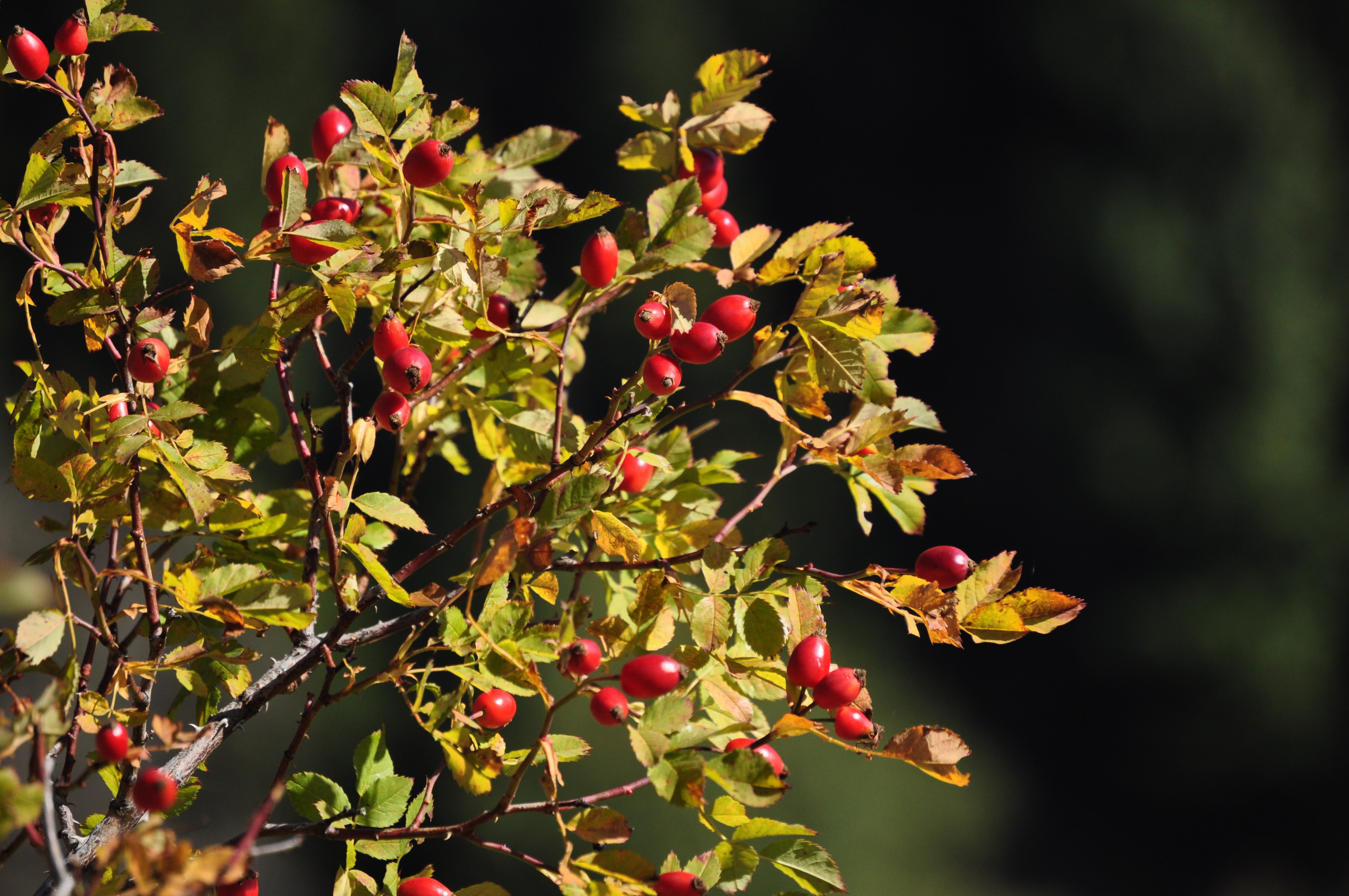 fruti i kaçes ne Bogë,Pejë